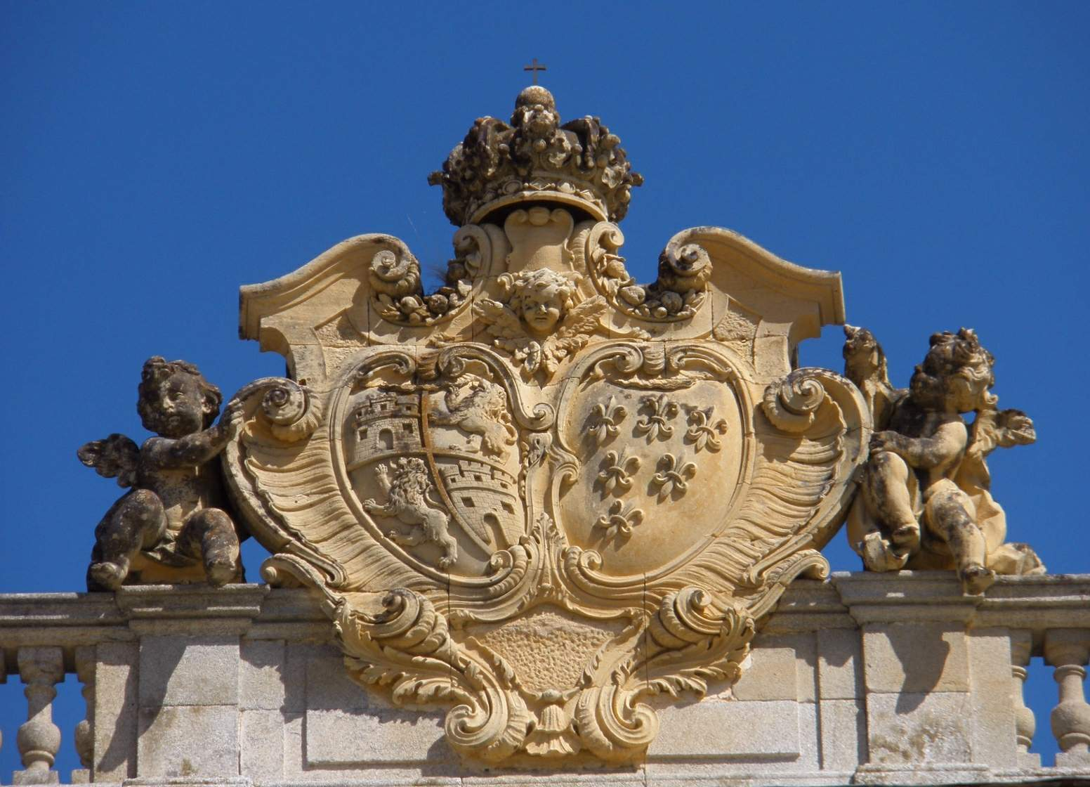 Palacio Real de Riofrío (Segovia)